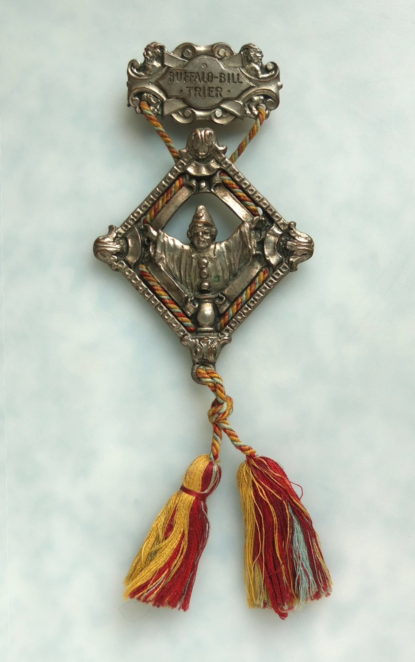 Trierer Karnevalsorden von 1907 mit Darstellung des Buffalo Bill und der Gravur "BUFFALO-BILL / TRIER". William Frederick Cody (alias Buffalo Bill) war mit seiner Wild West Show im Rahmen seiner seiner Europatournee am 16. Juni 1906 in Trier aufgetreten. Dieses Gastpiel führte dazu, dass der Trierer Karneval in der folgenden Session Buffalo Bill's Wild West Show als Motto wählte. Der abgebildete Karnevalsorden ist nicht datiert, jedoch durch zeitgenössische Fotos von Ratsmitgliedern der Trierer Karnevalsgesellschaft Heuschreck, die den Orden tragen, belegt.